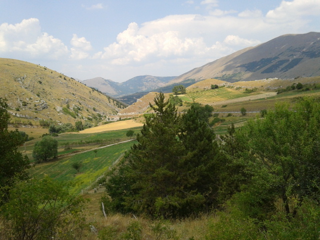 Foto panoramica da Aschi Alto